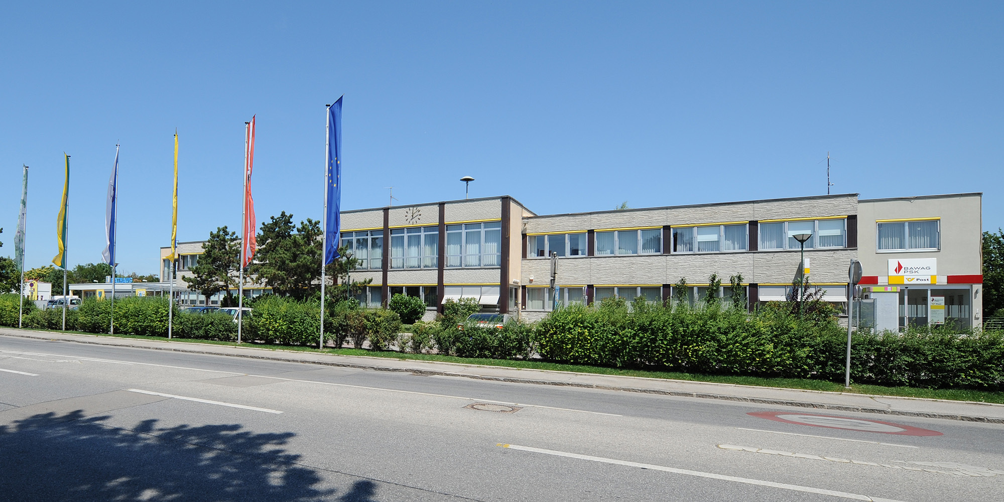 Wiener Neudorf: Rathaus, Europaplatz